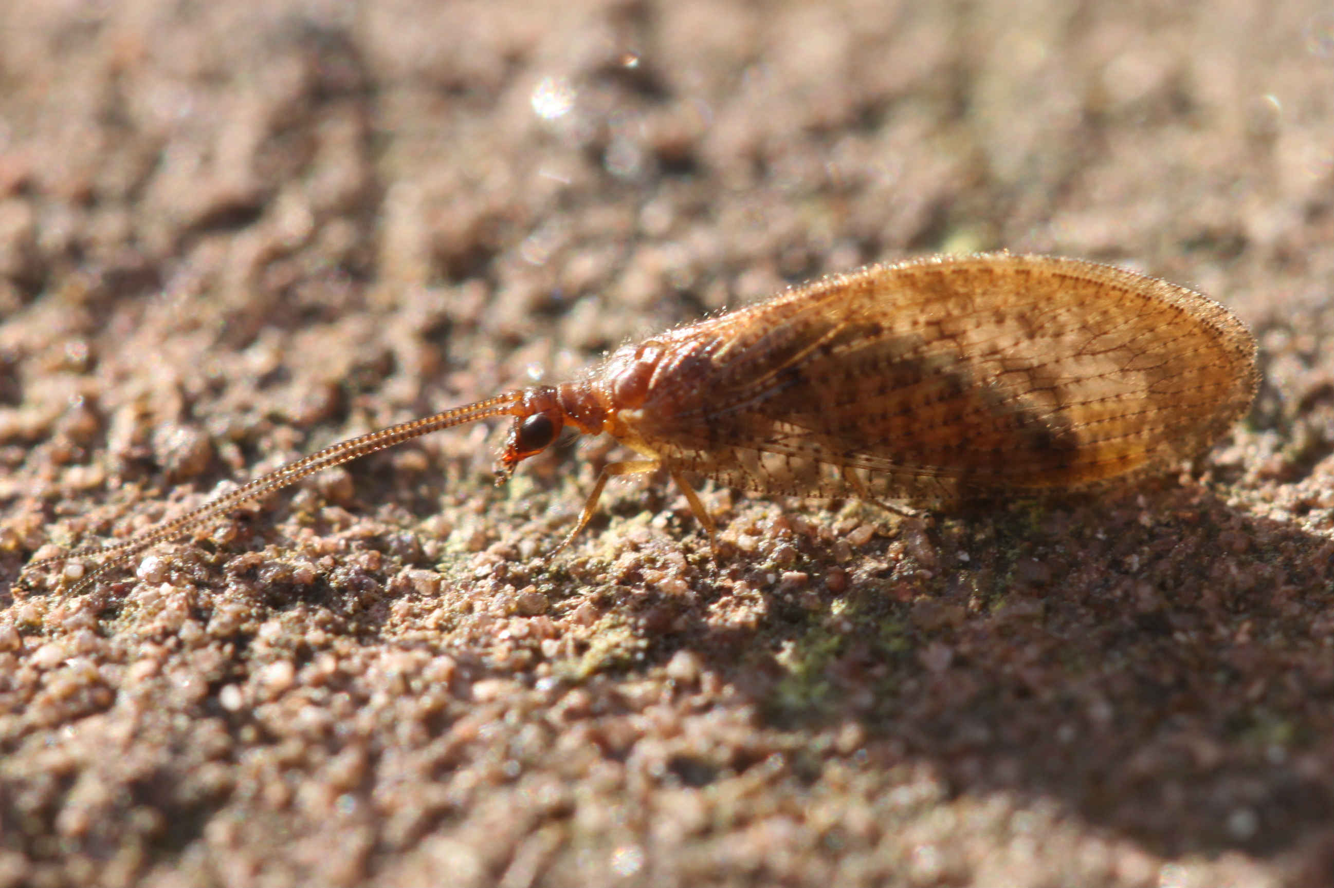 Hemerobius cf. stigma, am 25.3.2017 im Pfälzerwald